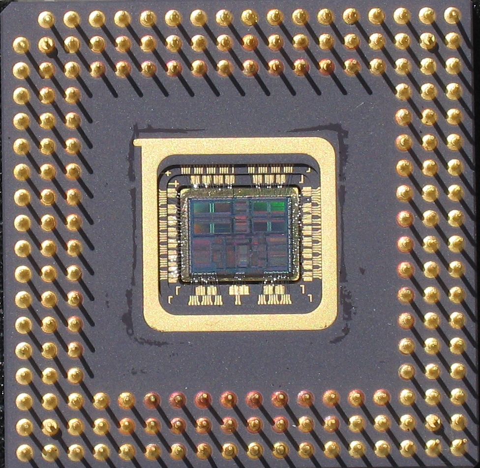 IDT R4700 die photo